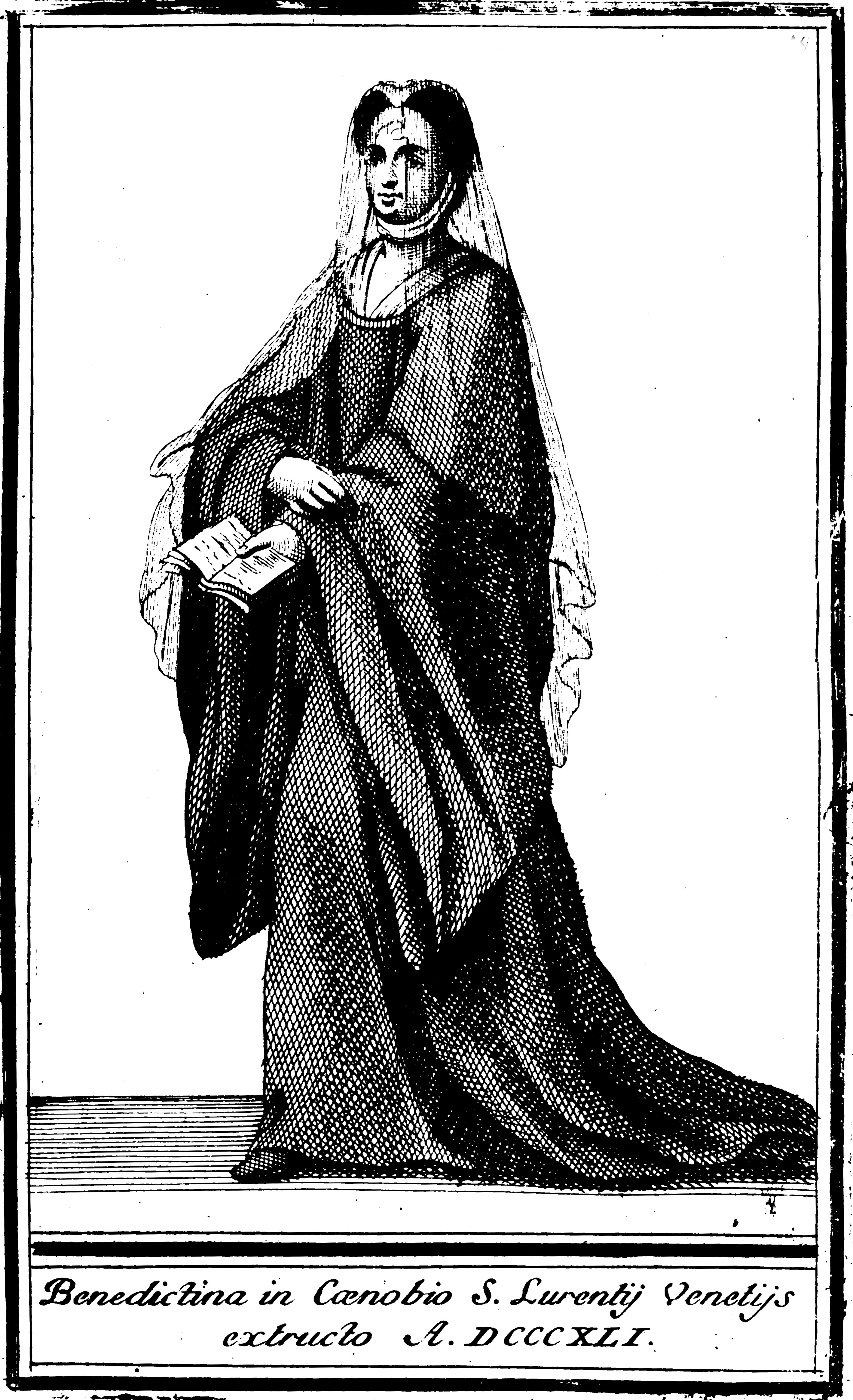 Benedectina in Cenobio S. Laurentij Venetijs